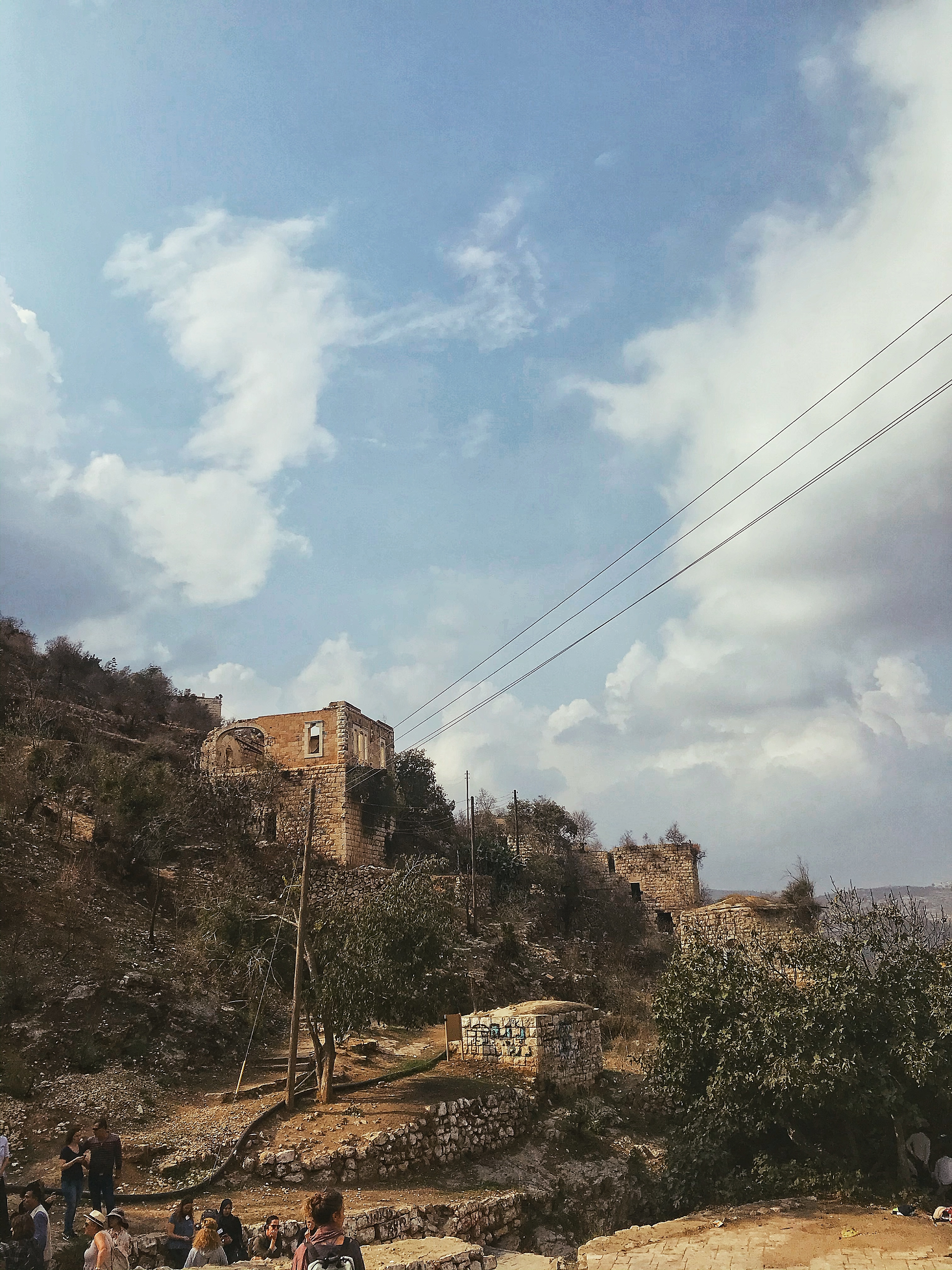 قرية قضاء القدس هجر أهلها عام ١٩٤٨، تحاول السلطات الإسرائيلية اليوم تحويلها لقرية فنانين